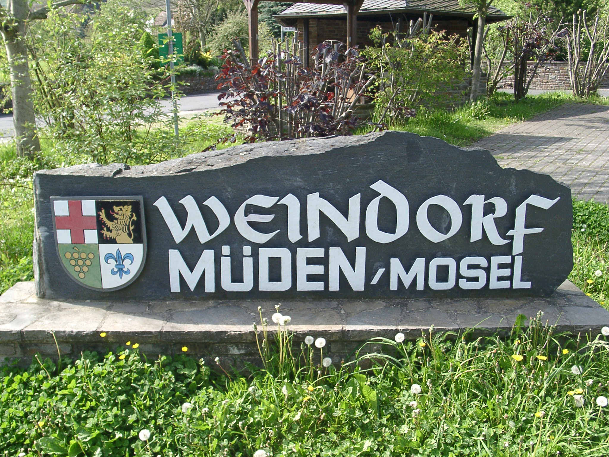 Wappen von Müden